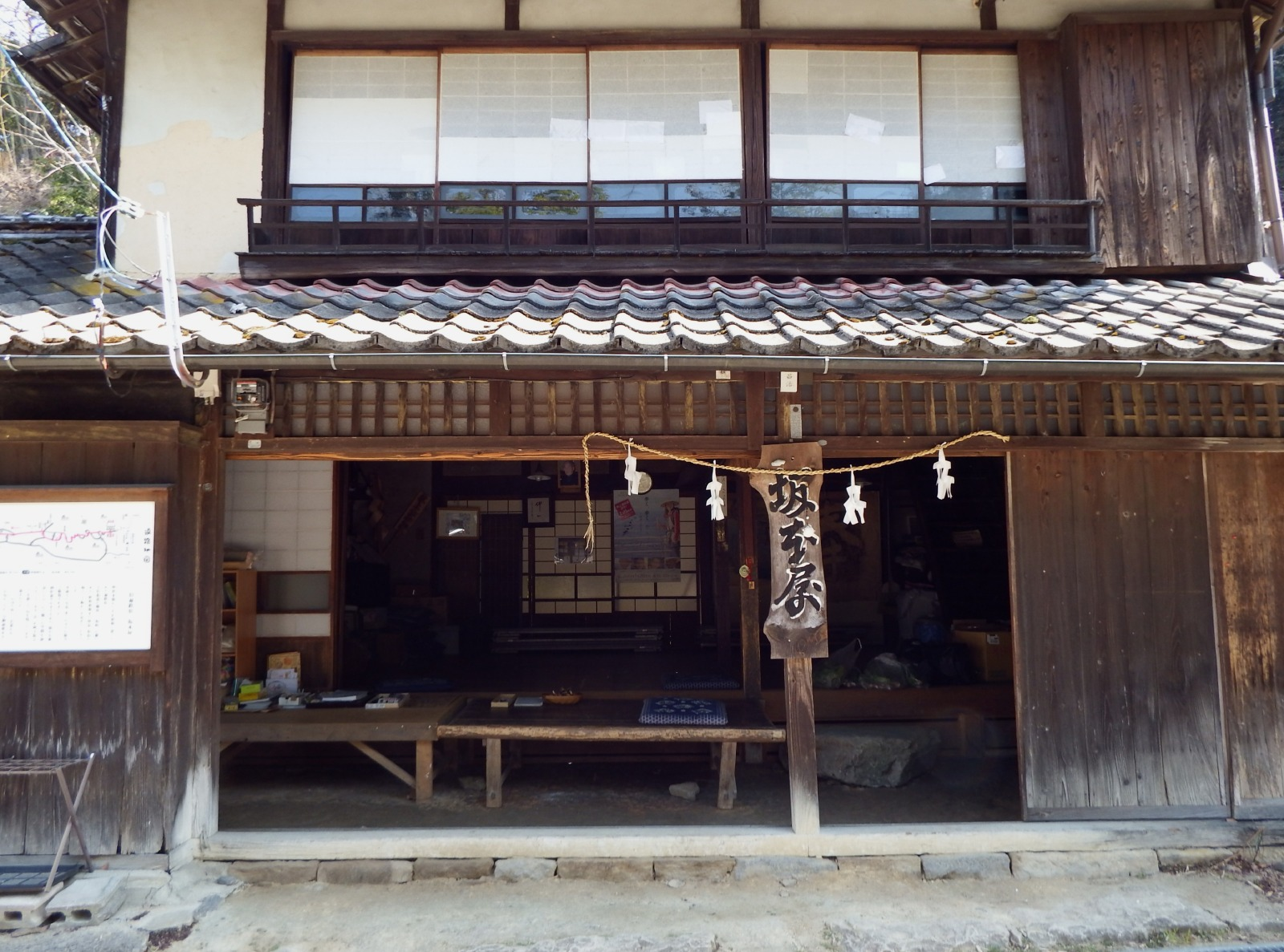 松山の坂本屋